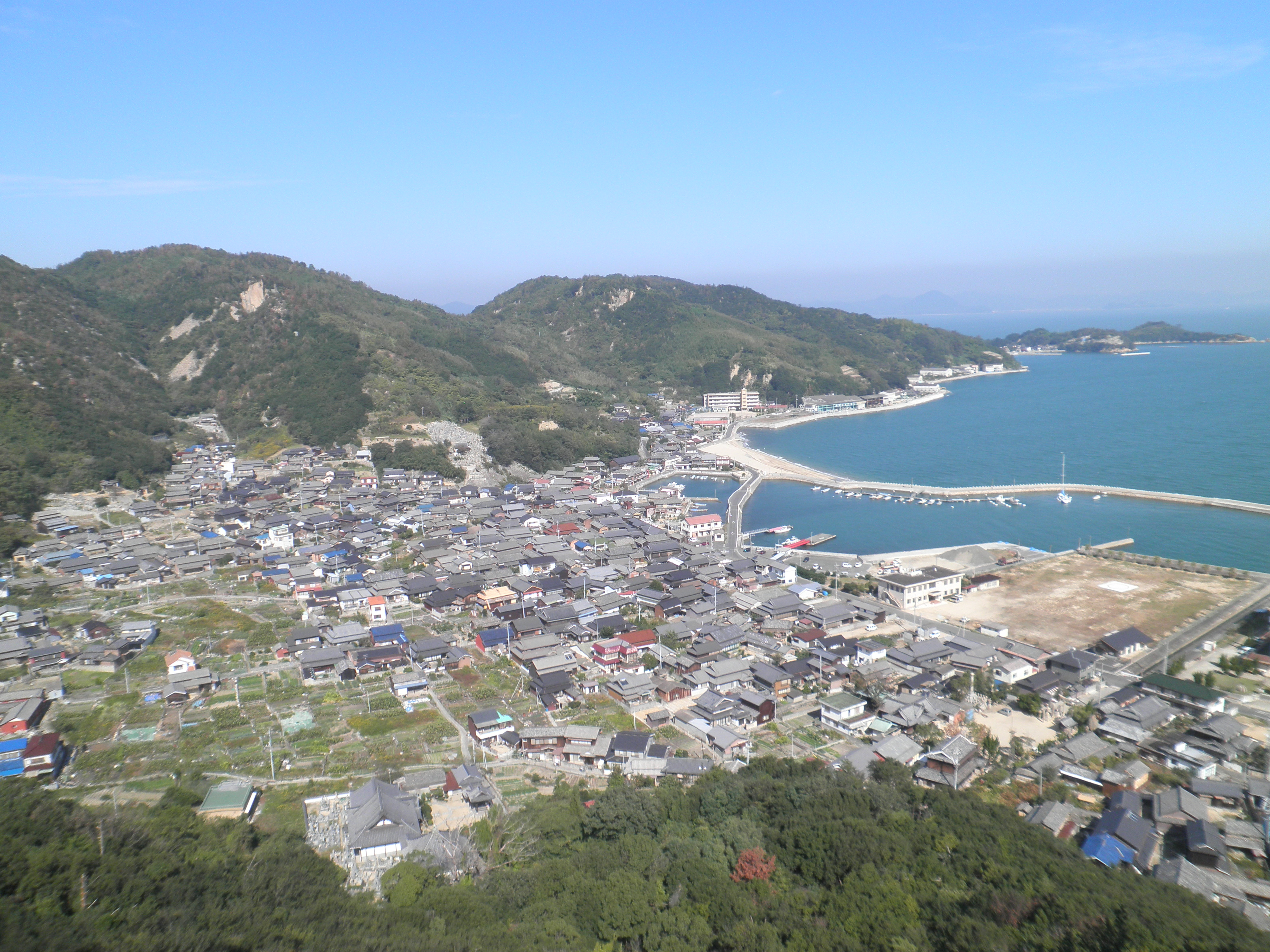 笠岡諸島のja:北木島にある秋葉山山頂から眺めた大浦集落